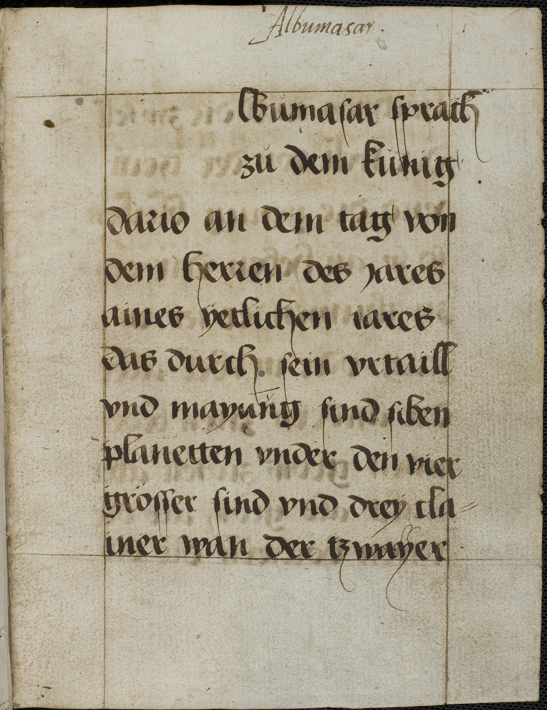 Codex Palatinus germanicus 13, Blatt 1r - Albumasar (Abū-Maʿšar Ǧaʿfar Ibn-Muḥammad): De significationibus planetarum (deutsch)